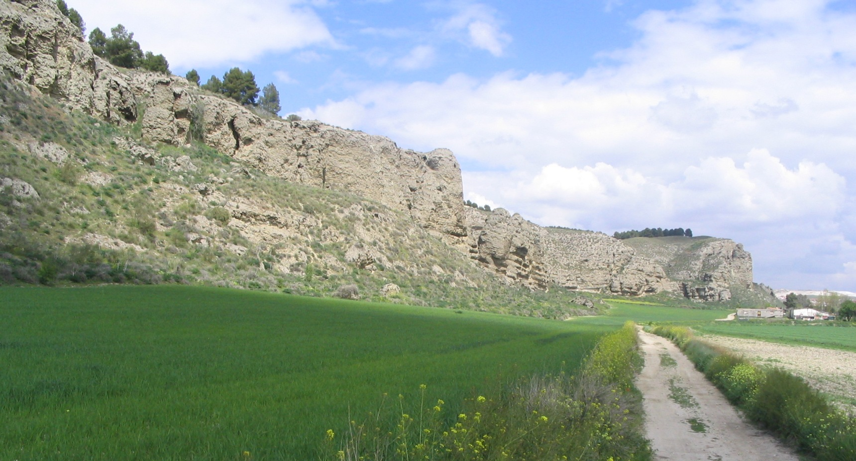 Cantiles de los Cerros de la Marañosa, ubicados en la Comunidad de Madrid, España